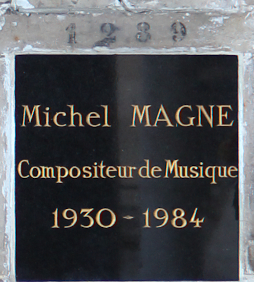 Case n°1289 de Michel Magne (1930-1984), au columbarium du cimetière du Père-Lachaise.